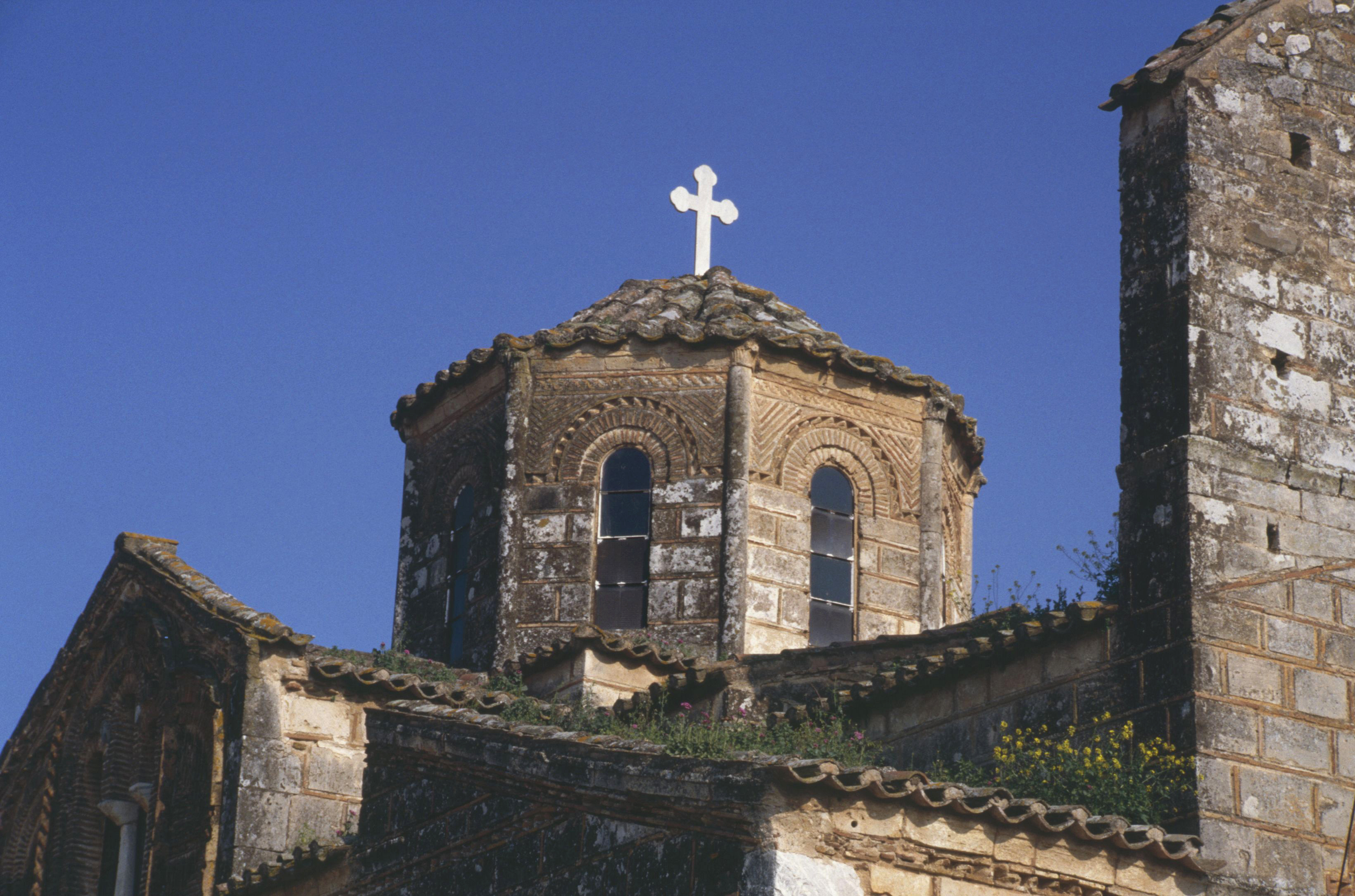 Detail der Panagia-Kirche in Agia Trias/Peloponnes